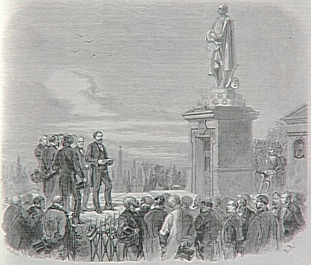 "L'Univers illustré" : "Inauguration du monument élevé à la mémoire de Fromenthal Halévy au cimetière de Montmartre". 2 avril 1864